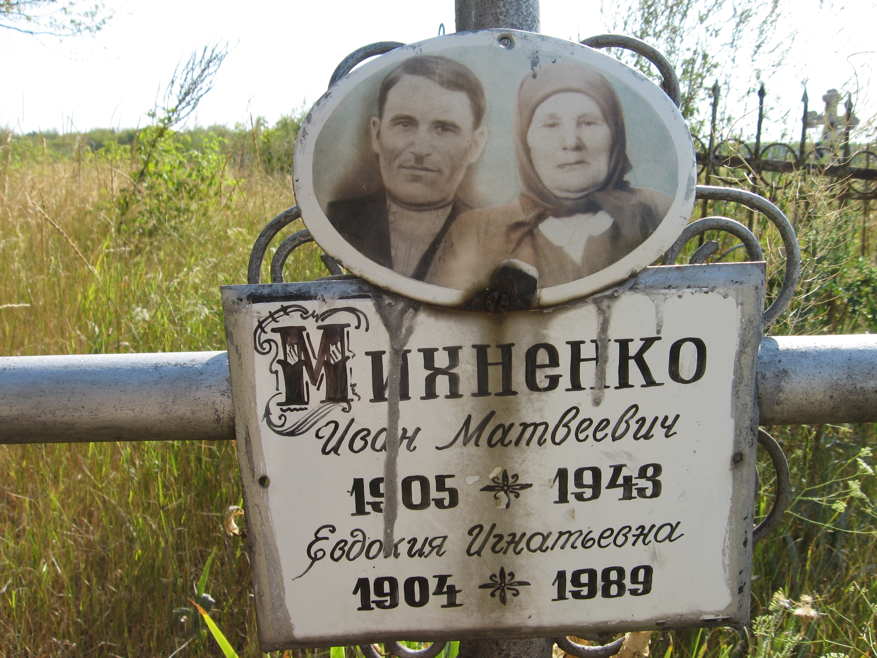 Табличка з могили Михненків в селі Дубове. Воно знаходиться неподалік (3,7 км) від первинного положення д.Дубової. Поселення перенесено з-за будівництва аміачного трубопровода. В сусідньому Водяному є декілька сімей Михненків. Один з цих Михненків говорив, що знає про спільне коріння з Нестором.